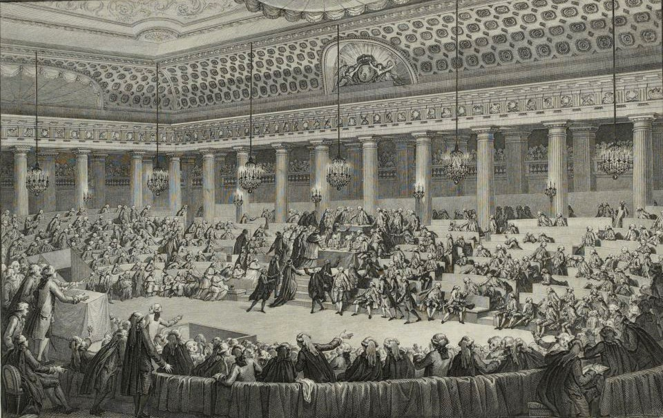 Nuit du 4 août 1789 dans l' Assemblée nationale française. Abandon de tous les privilèges féodaux. Musée de la Révolution française - Vizille.